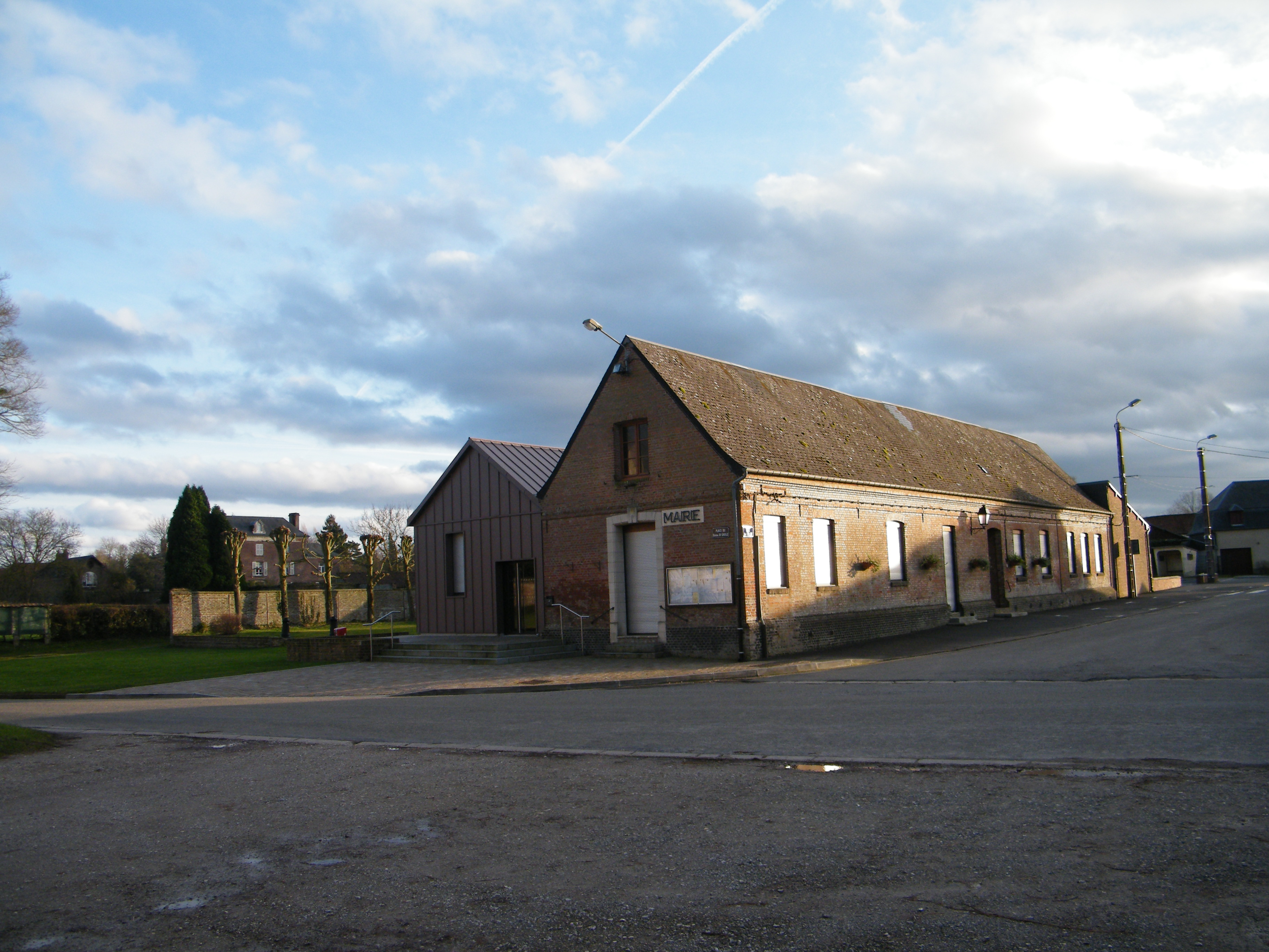 Huppy, Somme, Fr, mairie